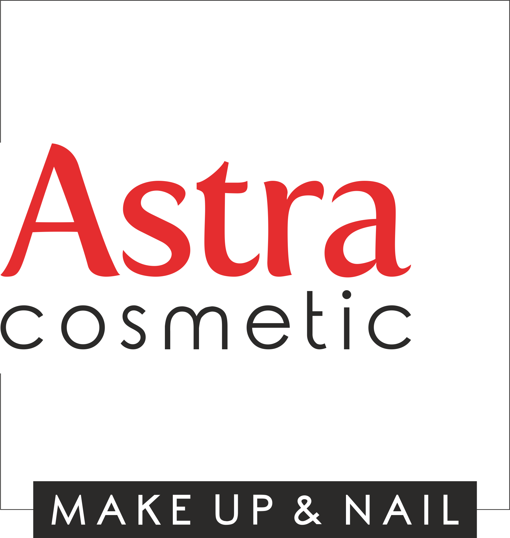 Даний файл містить логотип компанії Астра Косметик